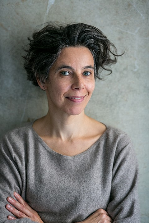 Die österreichische Illustratorin, Grafikerin und Bilderbuchautorin Verena Hochleitner